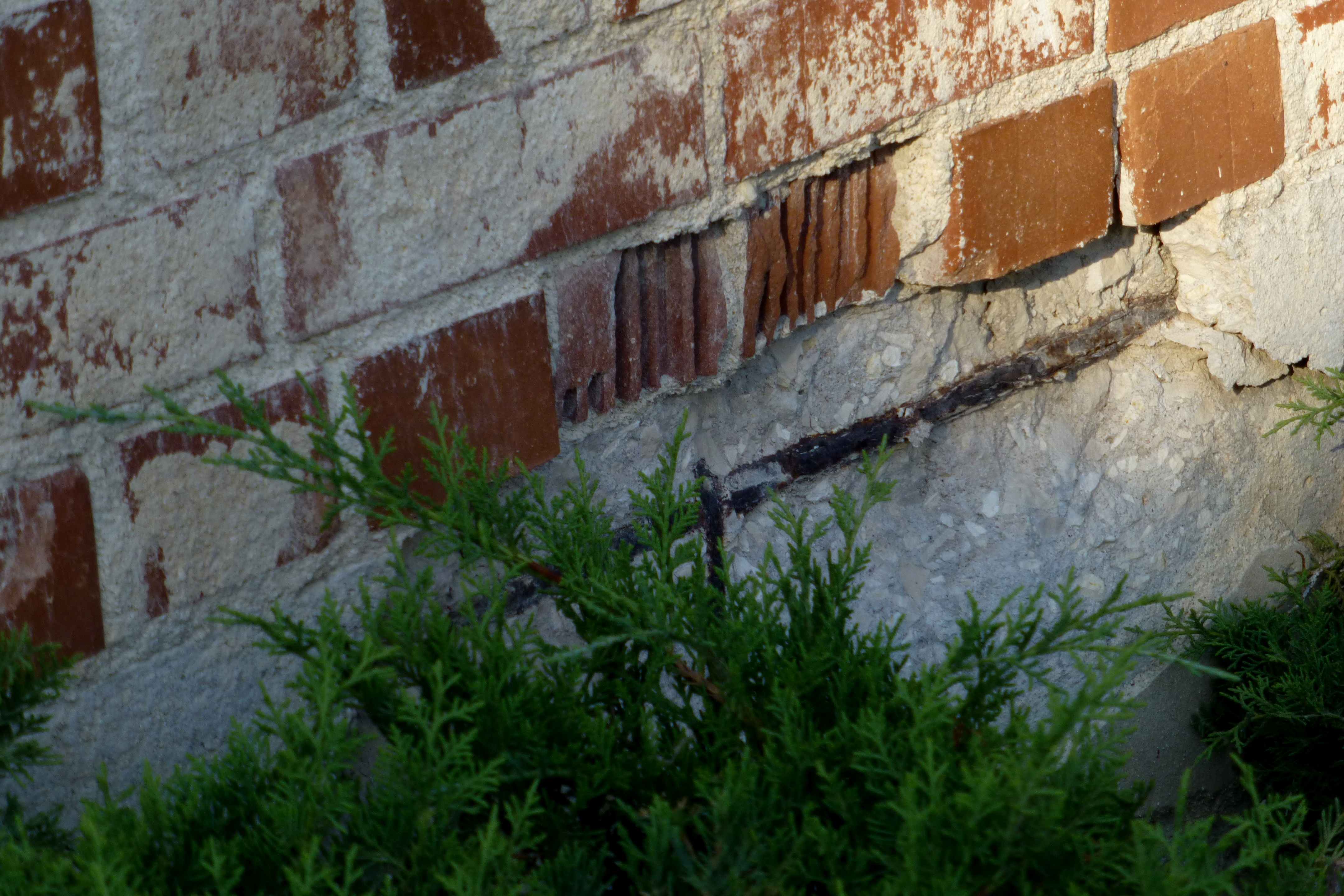 בית הקירור שימש את איכרי הכפר לאיחסון תפוחי אדמה שגידלו. הקיבולת היתה: 80 טון. בהמשך הושכר בית הקירור לשימושם של קיבוצי הסביבה תמורת תשלום. בימי מלחמת השחרור שימוש המקום לאיחסון נשק. בית הקירור אמור לעבור תהליך שימור ולהכיל בתוכו את ארכיון הישוב.